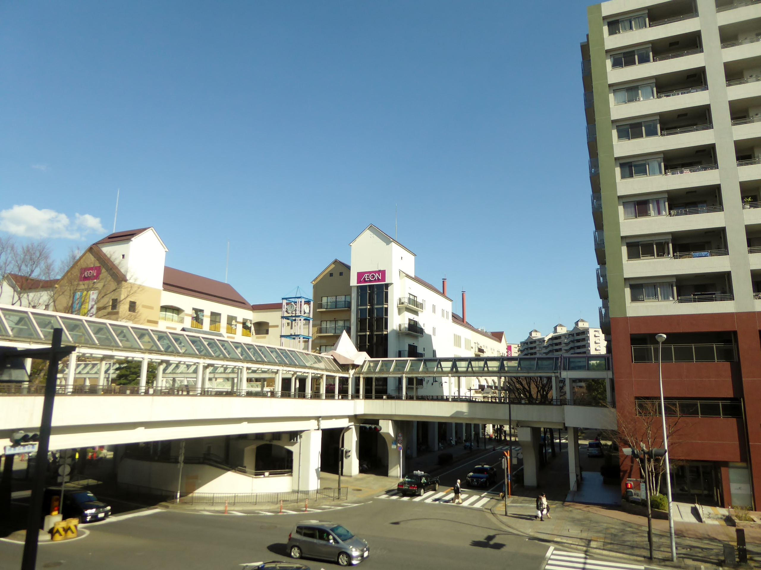 2016年1月24日時点のイオン本牧を撮影。